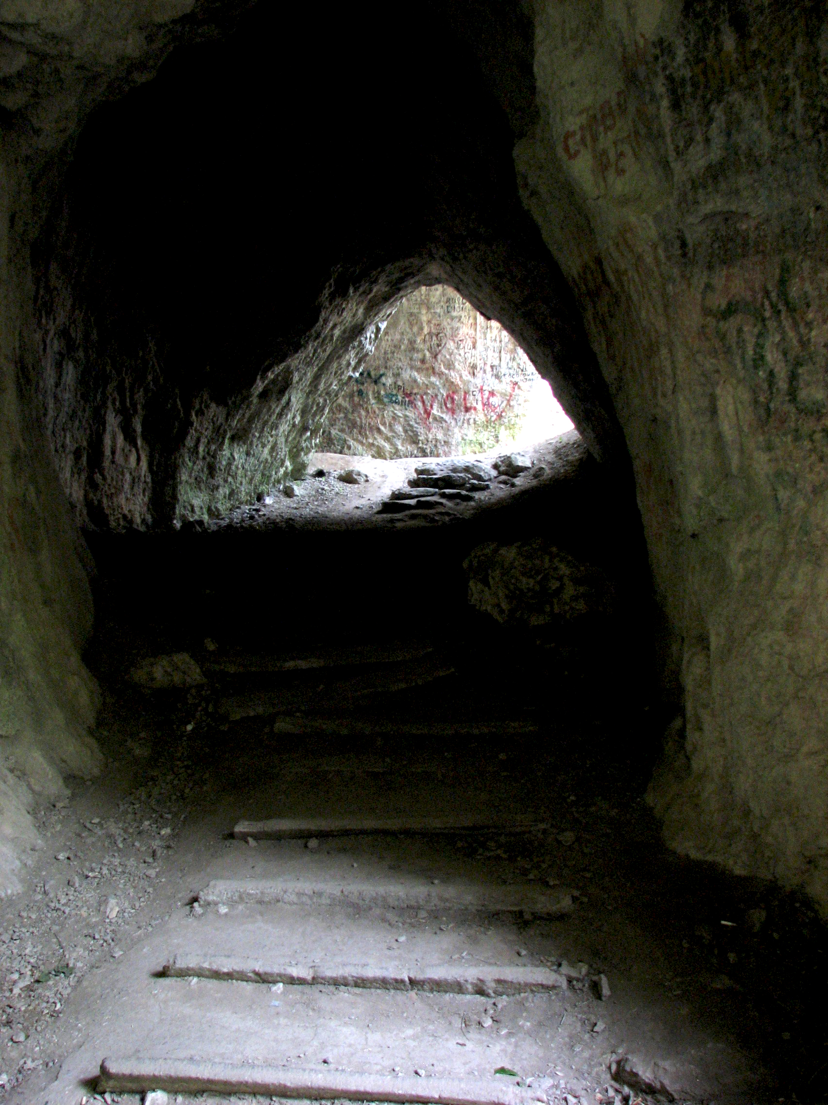 Grota Haiducilor, Baile Herculane, Romania